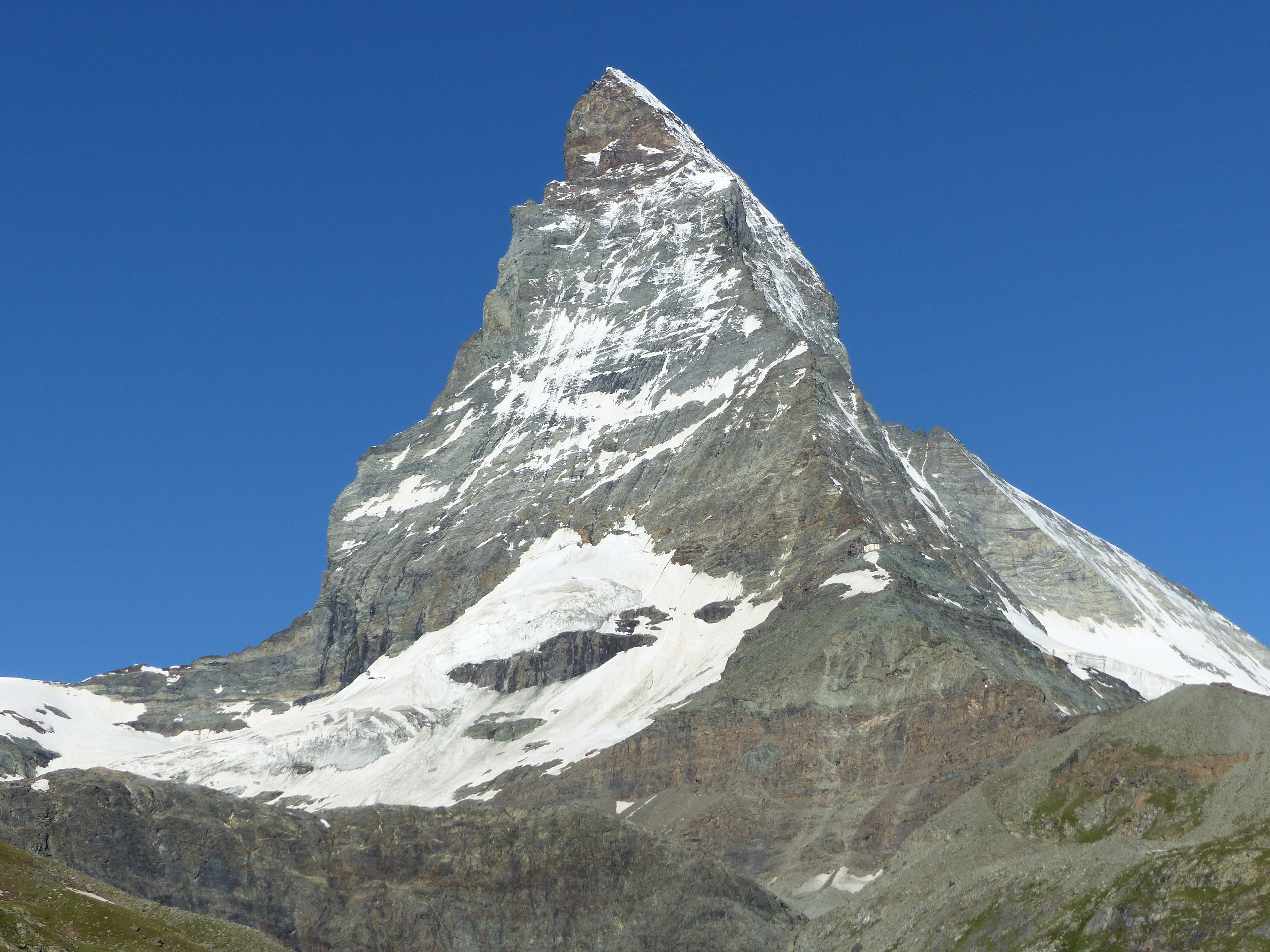 Matterhorn. Standort: Etwas oberhalb der Station Furgg beim Aufstieg zur Gandegghütte.